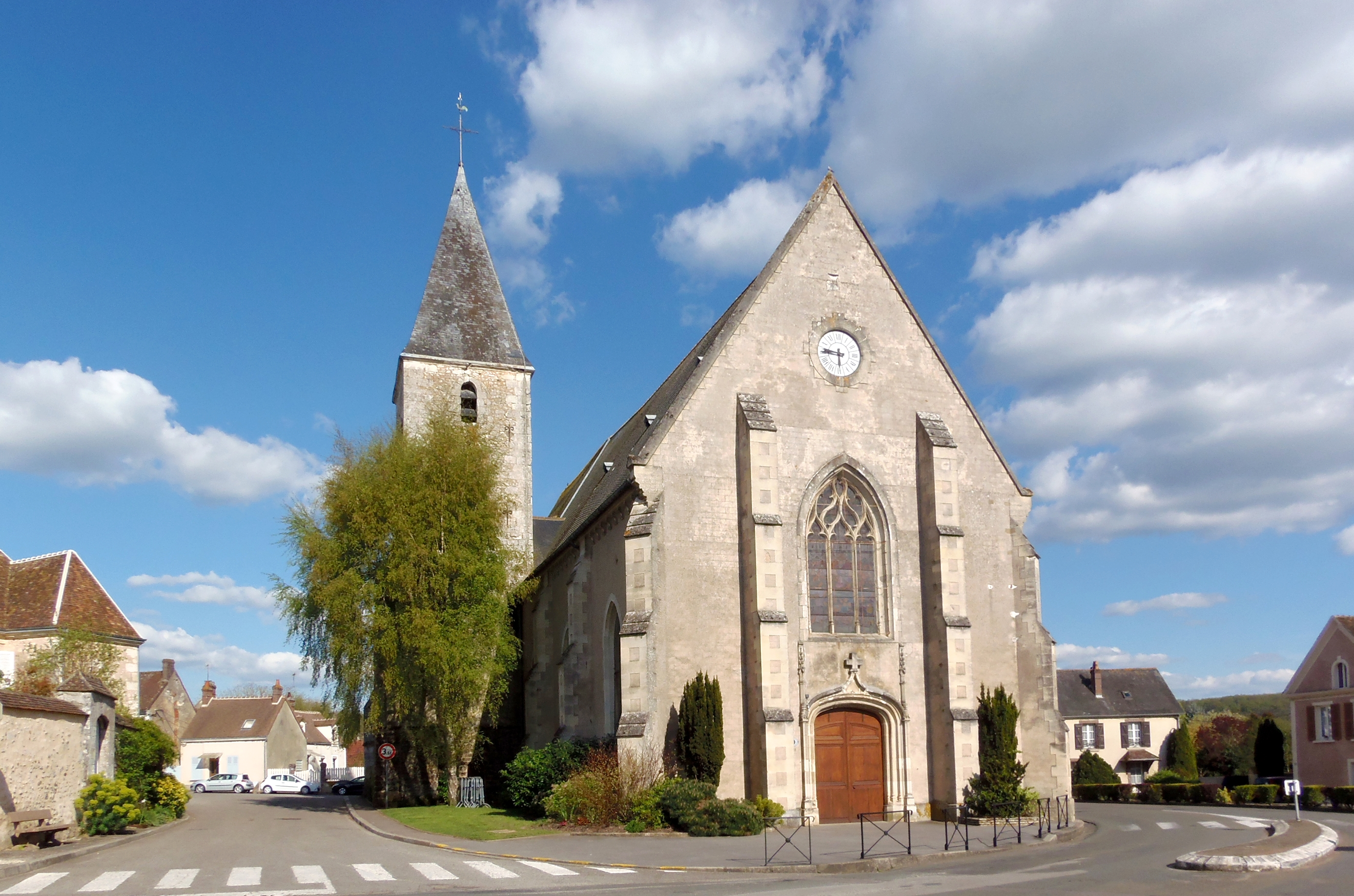 Condé-sur-Huisne (Normandie, France). L'église Notre-Dame.